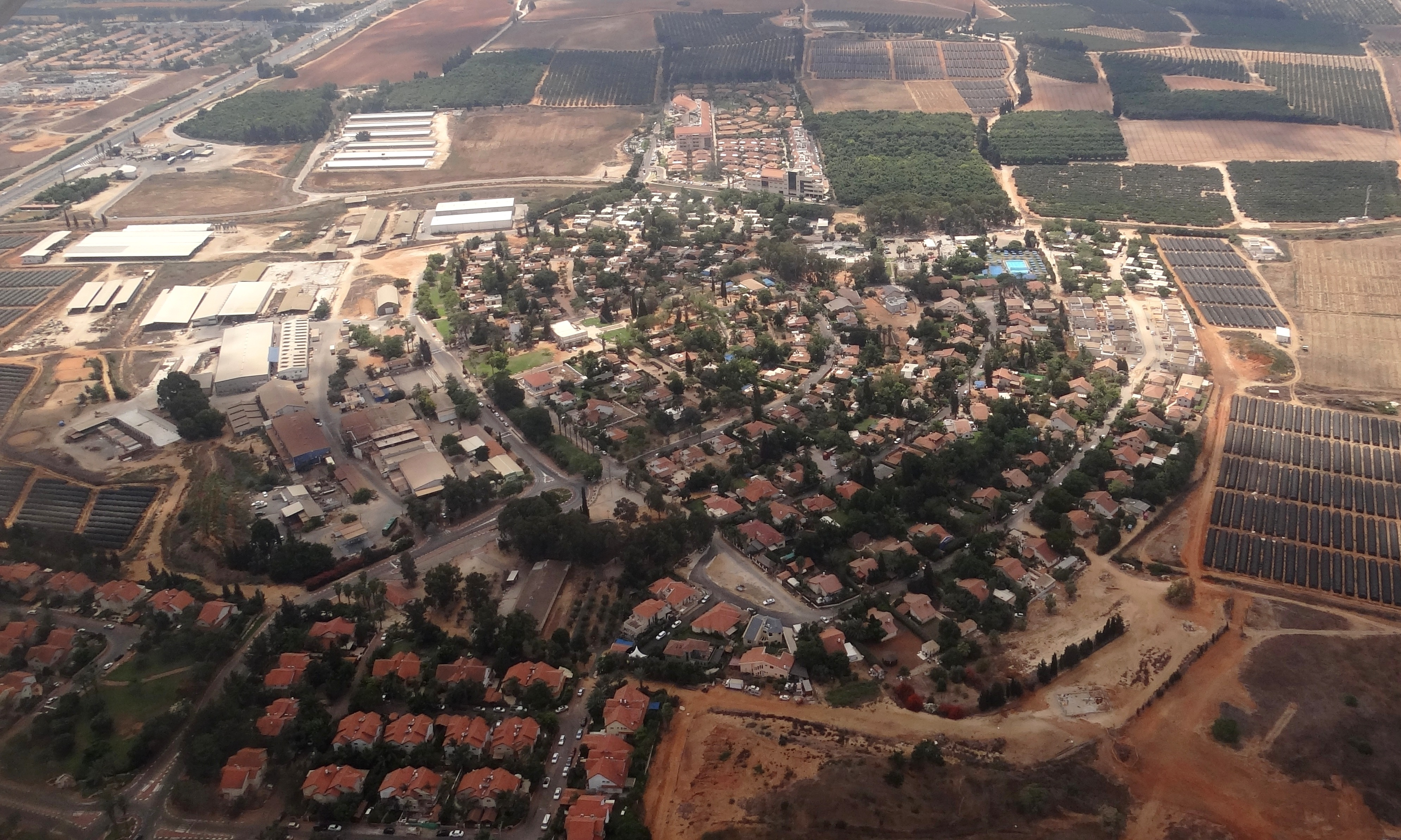 תצלומי אוויר של נורדיה יישוב בשרון בקרבת נתניה